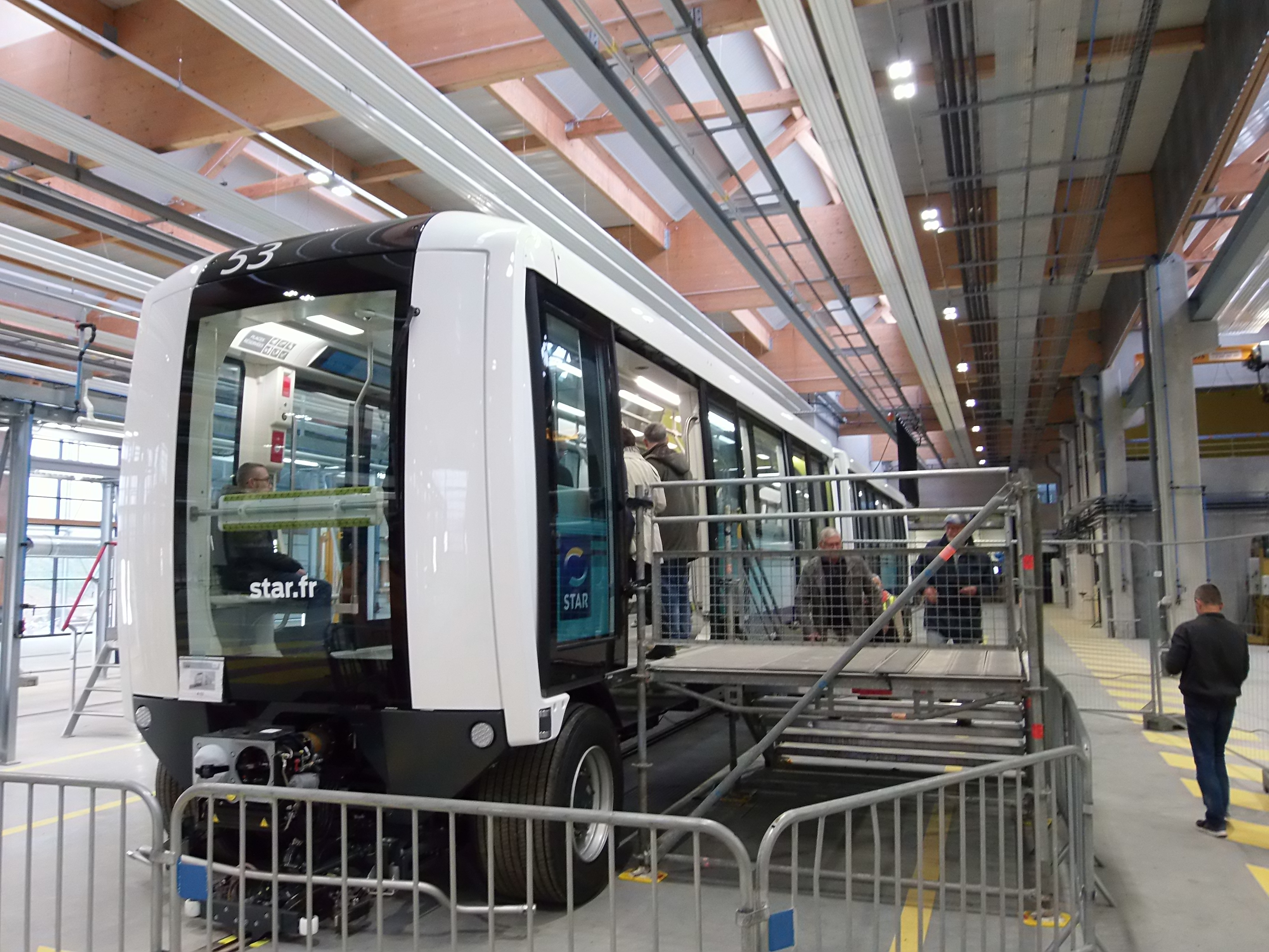 Rame Cityval. Photo prise lors des portes ouvertes de l'atelier du métro ligne B de Rennes, à Saint-Jacques-de-la-Lande.